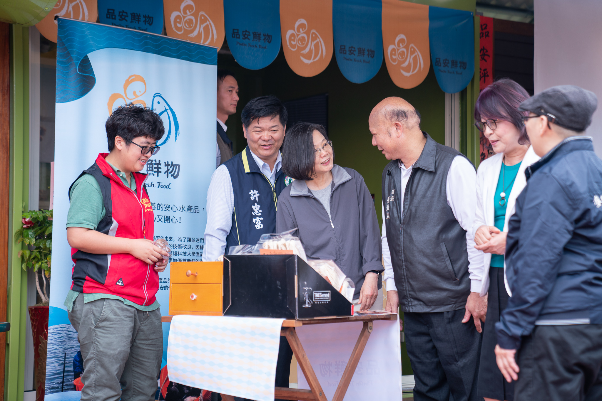 左二起許忠富、蔡英文、蔡長昆、蘇治芬等人。